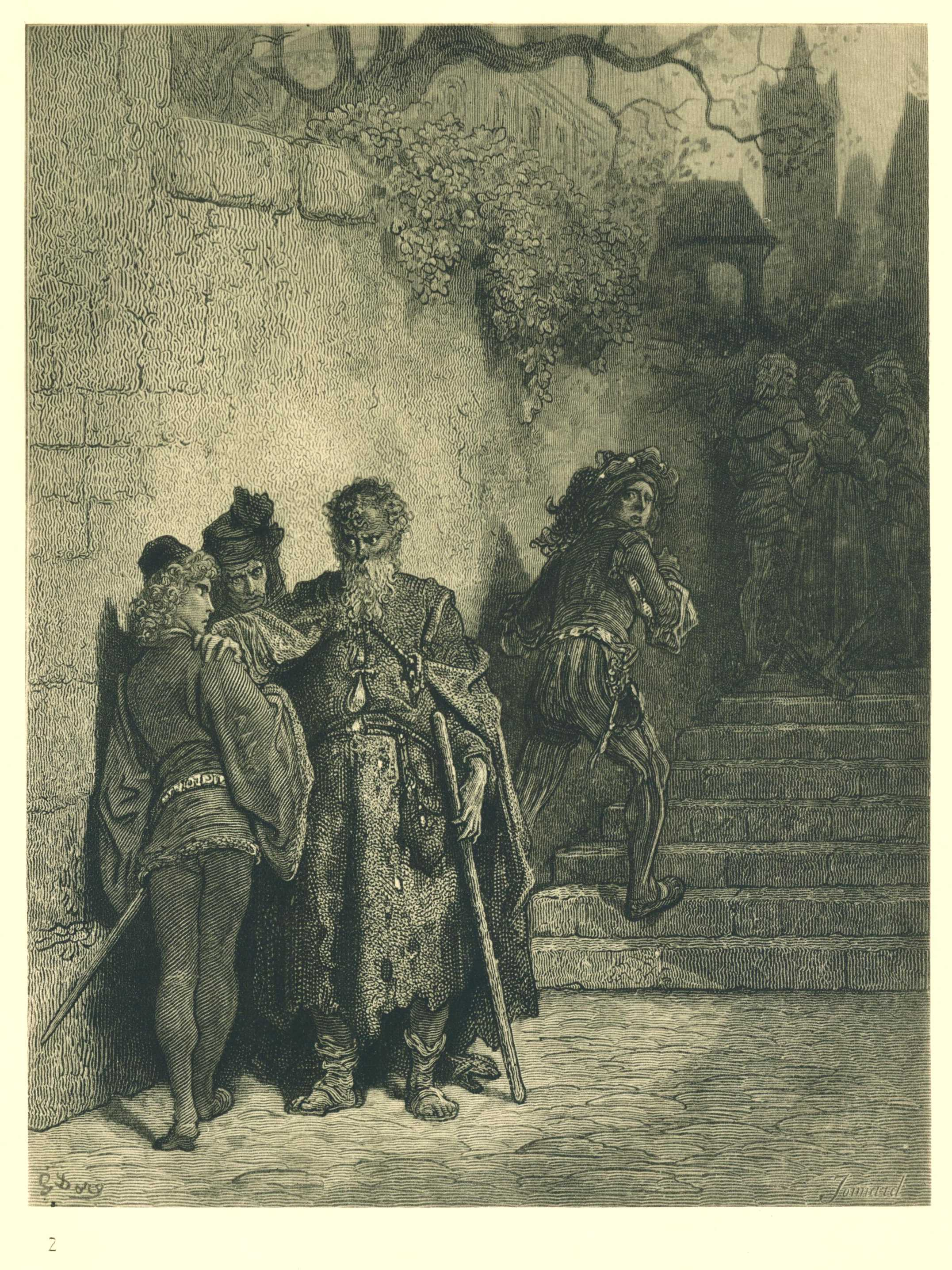 Einen alten Seemann gibt’s, der hält von Dreien einen an (Beschreibung lt. Quelle)